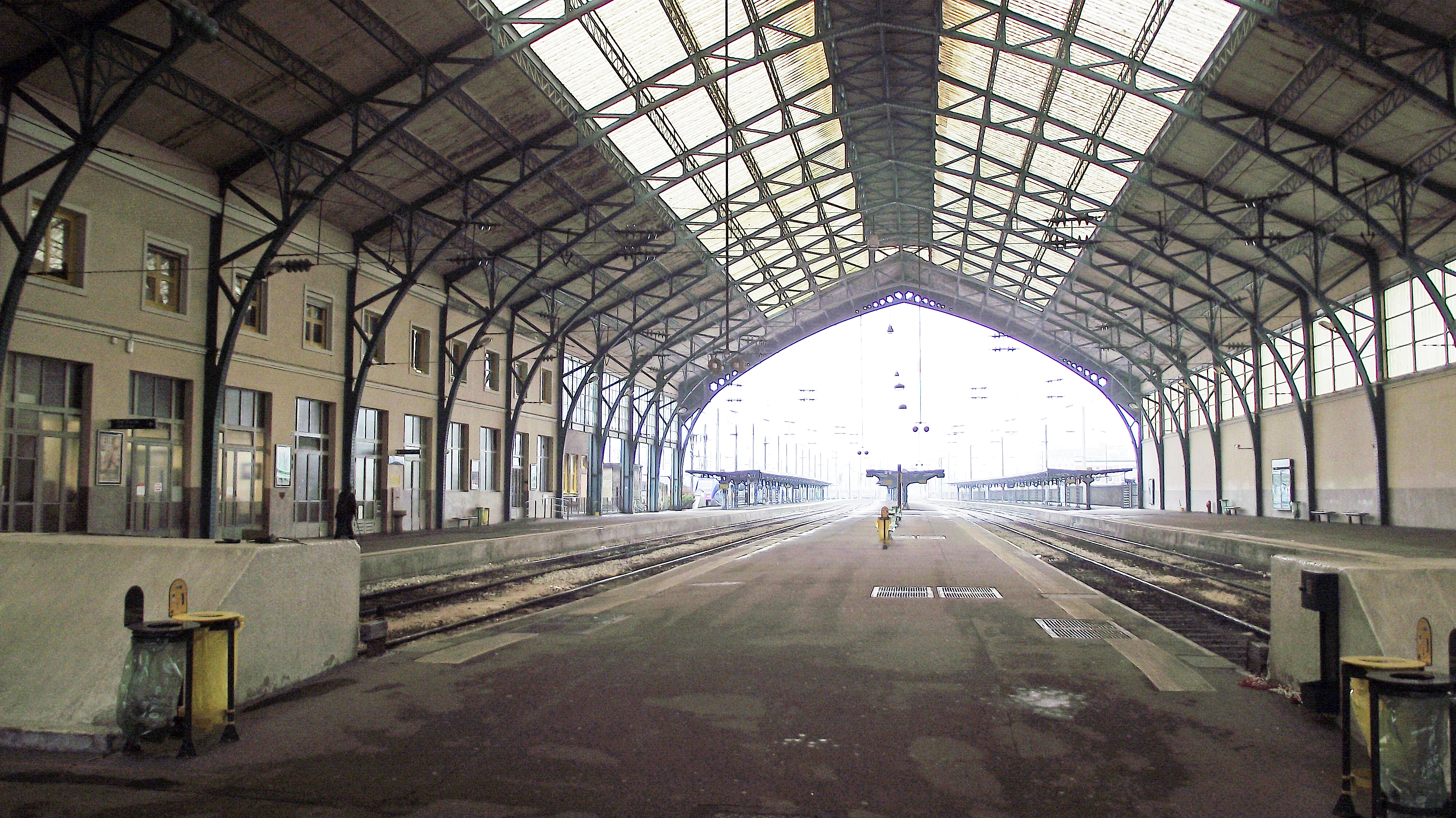 Treinhal